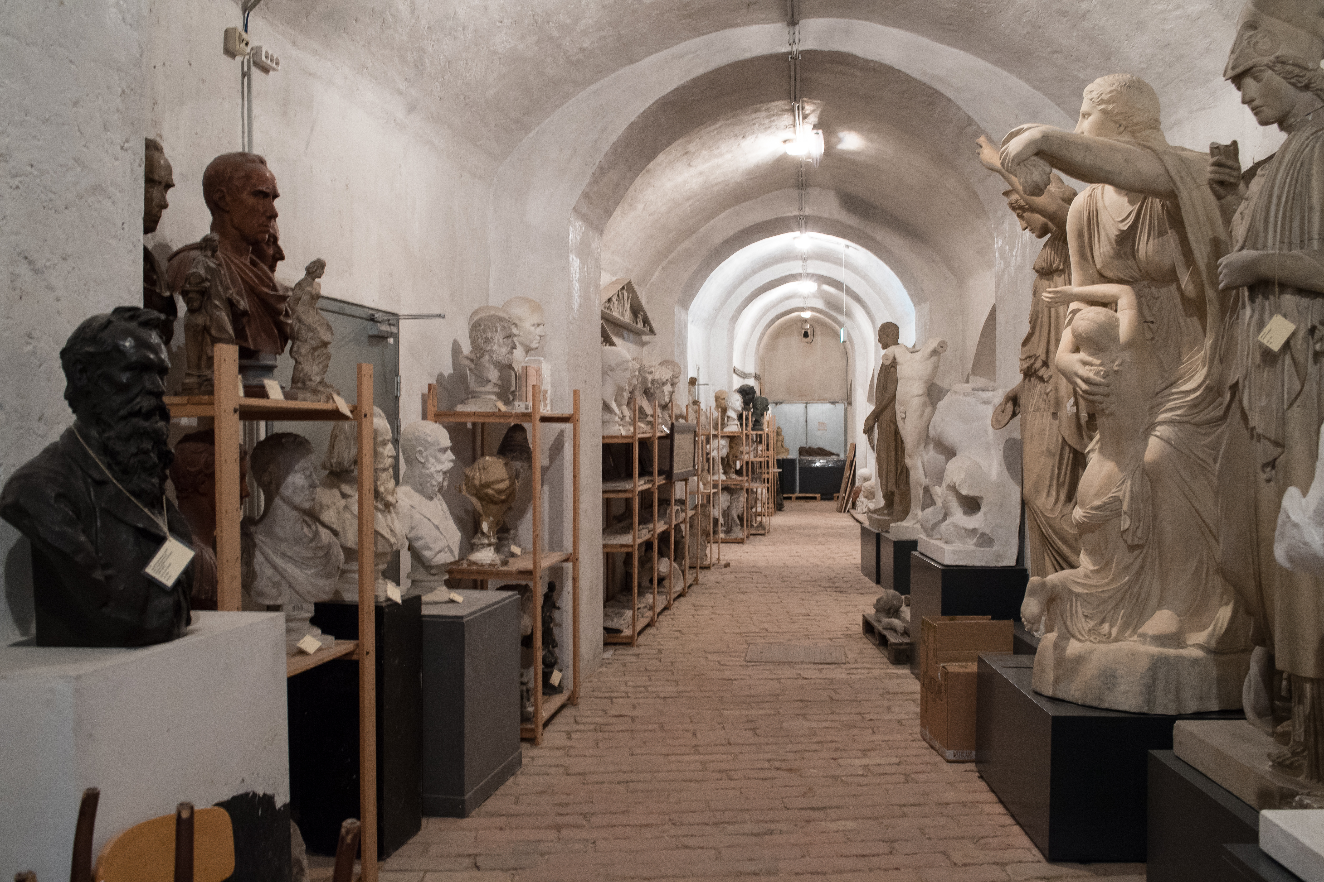 Wien, 26. Juni 2019: Glyptothek im Atelierhaus der Akademie der Bildenden Künste (Semperdepot)